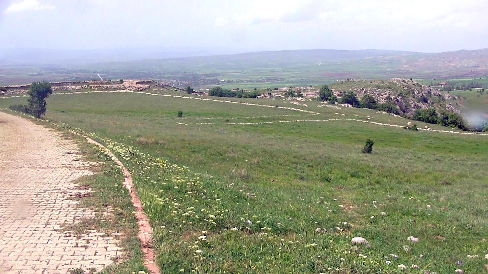 Ḫattuša, hethitische Hauptstadt bei Boğazkale, Zentraltürkei, Ostteiche